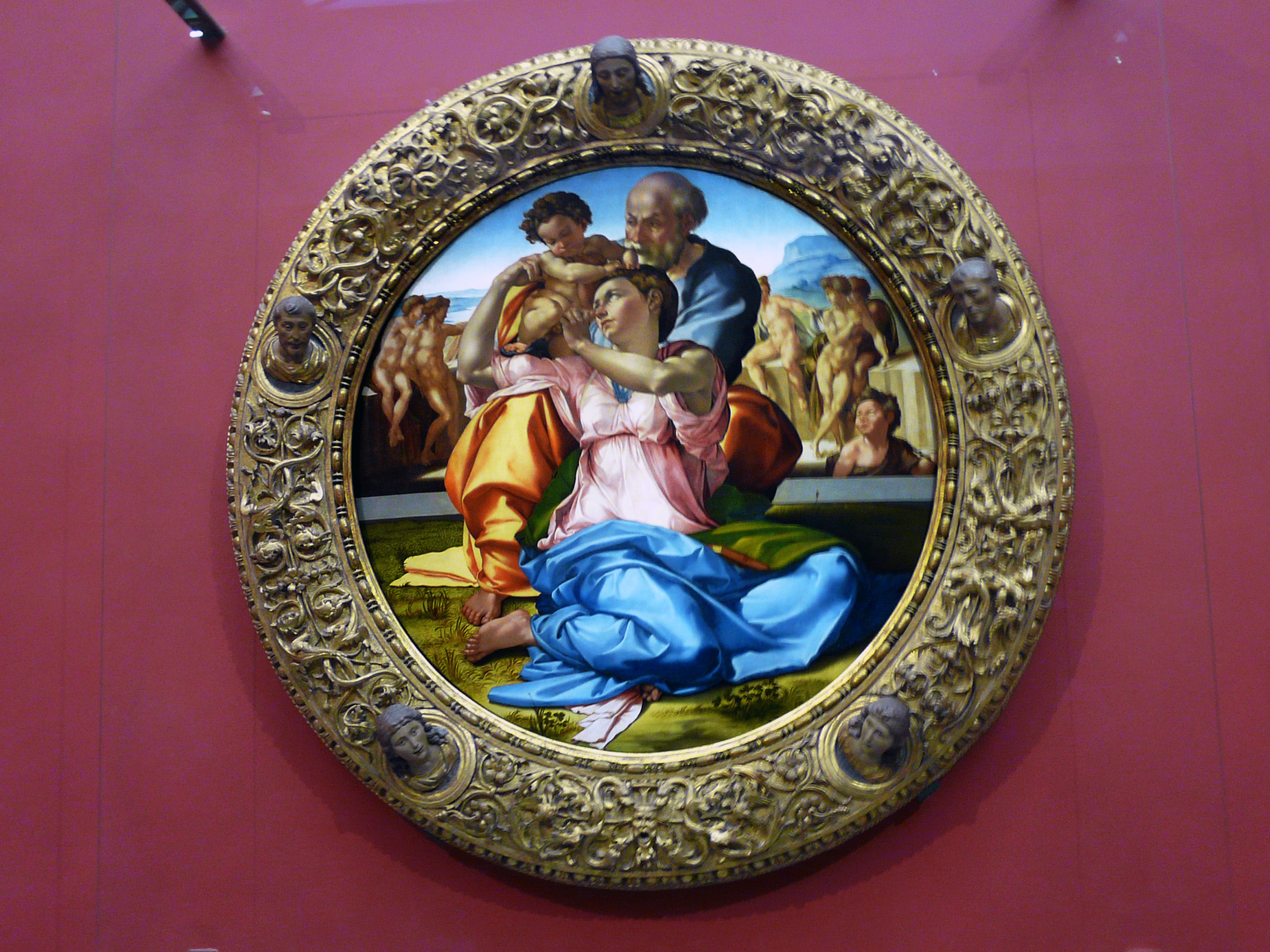 Микеланджело Буонарроти. Святое Семейство с юным Иоанном Крестителем.